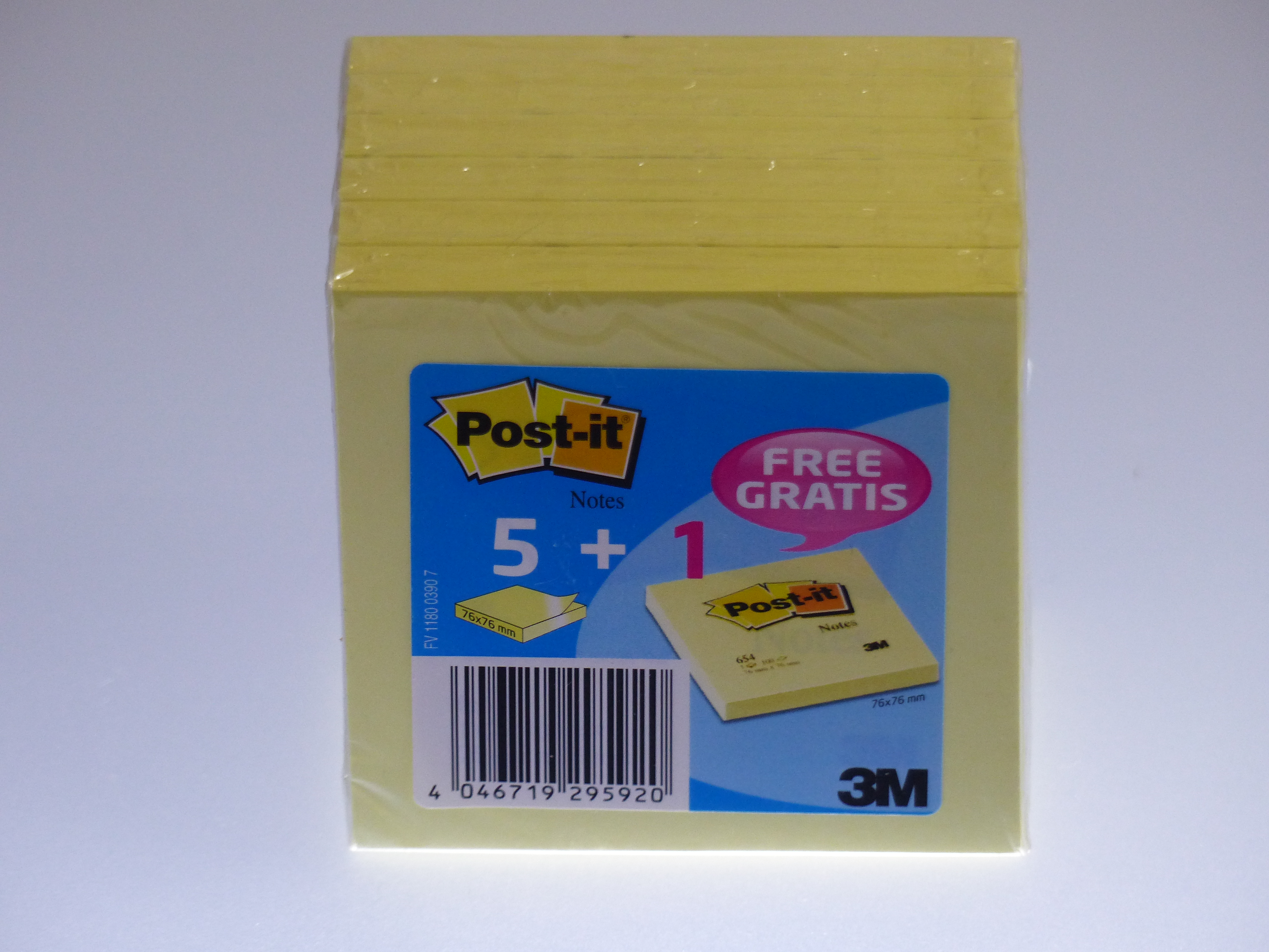 Post-it notes